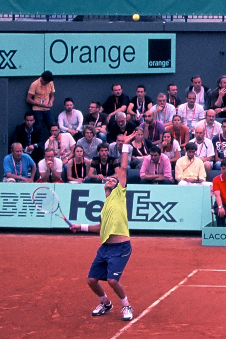 Paul-Henri Mathieu sert sur le court numéro 1 dans son 5e set contre Marcel Granollers, au 3e tour de Roland-Garros 2012